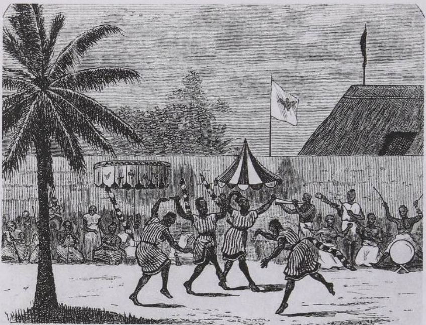 Kvinner danser med leopardhaler festet på baken. Dahomey 1871